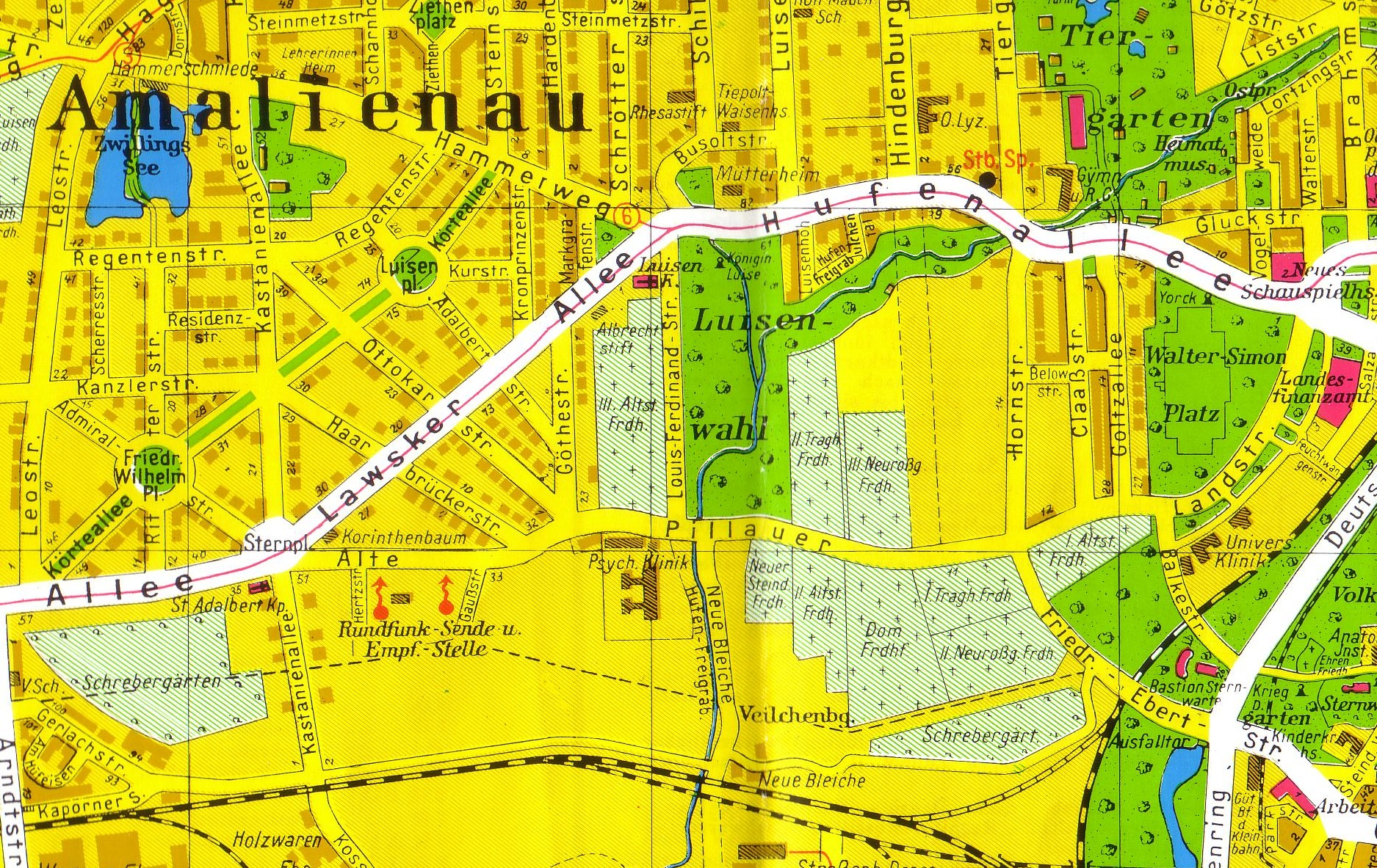 Friedhöfe im Westen von Königsberg in Preußen